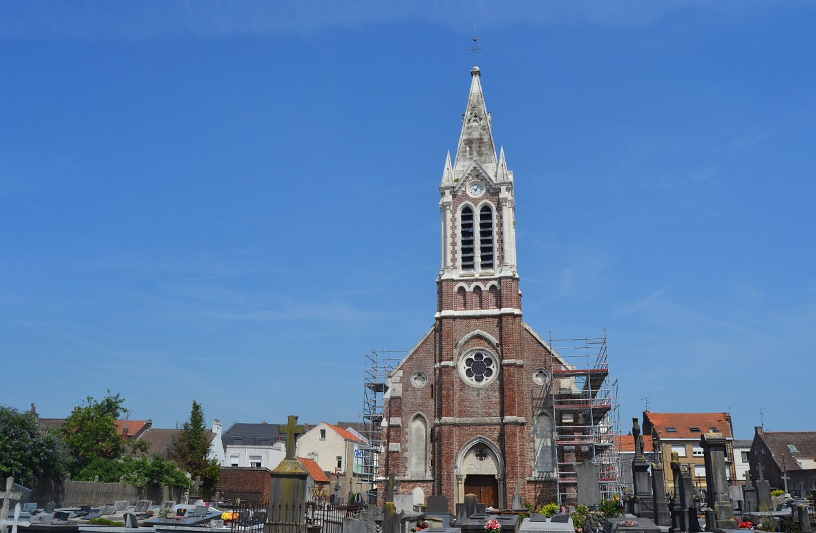 L'église